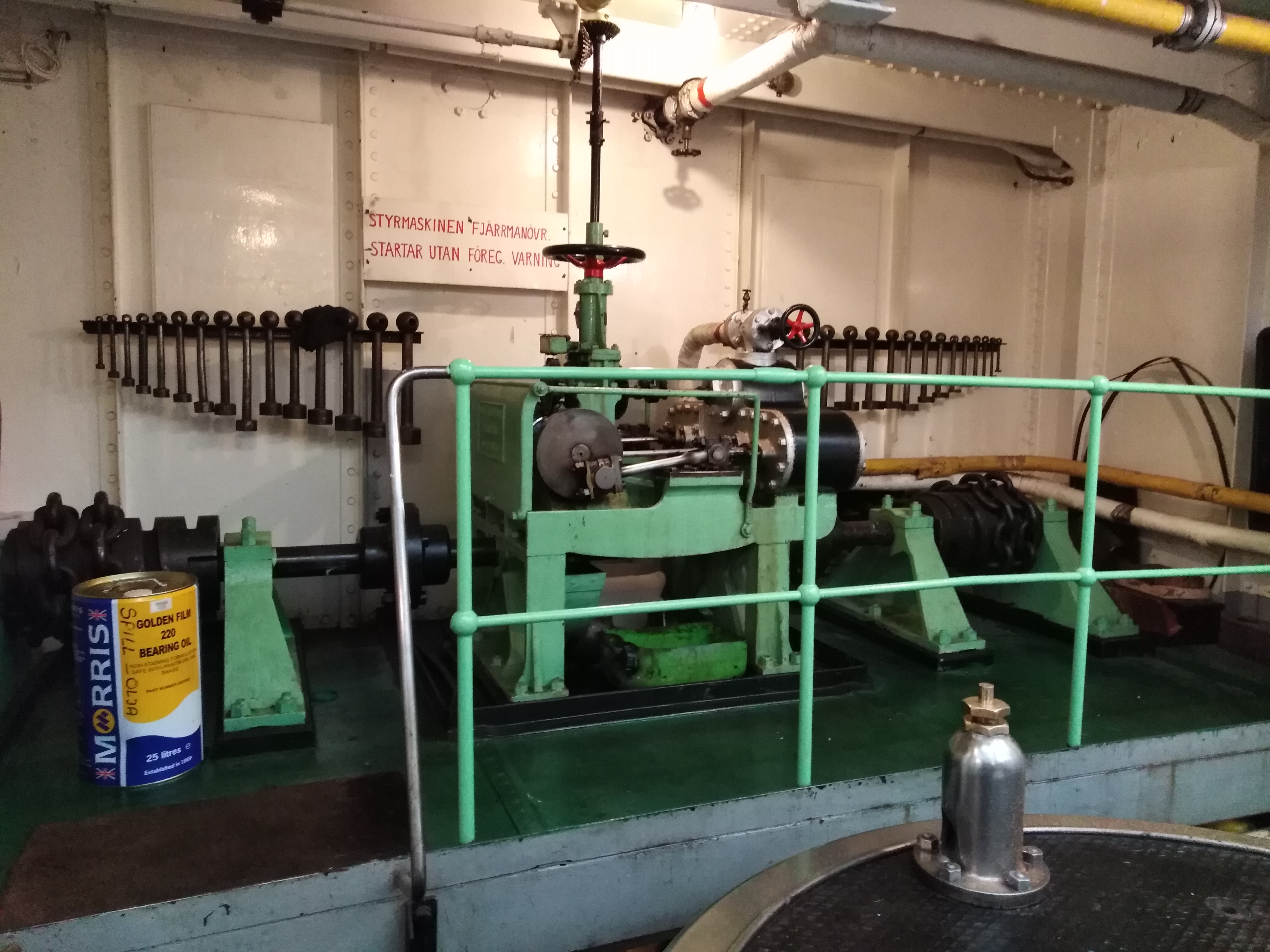 servosterzo a vapore in sala motore posteriore